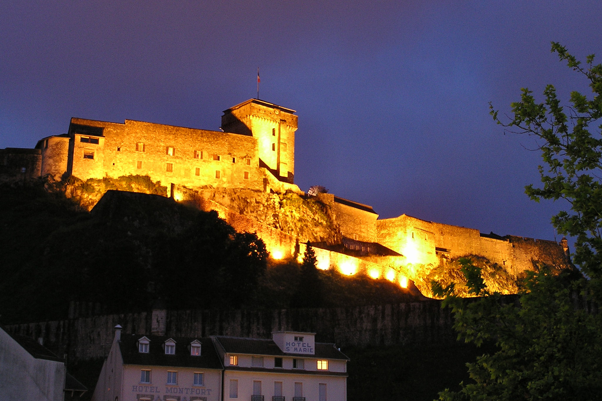 château de lourdes la nuit